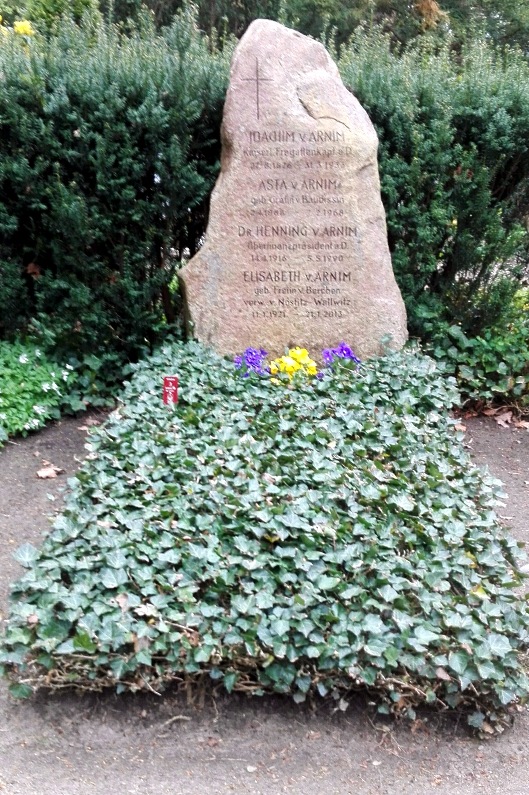 Familiengrab der Familie v. Arnim auf dem lübeckischen Burgtorfriedhof.